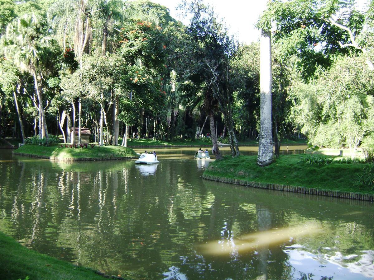 Parque do Museu Mariano Procópio, Juiz de Fora